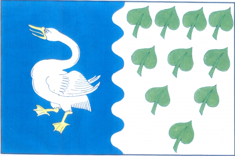 vlajka, Myštice, okres Strakonice